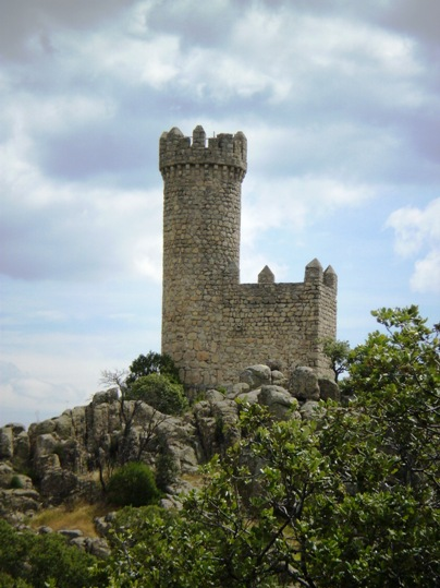 Torre vigía (o atalaya) de Torrelodones (Madrid, España)